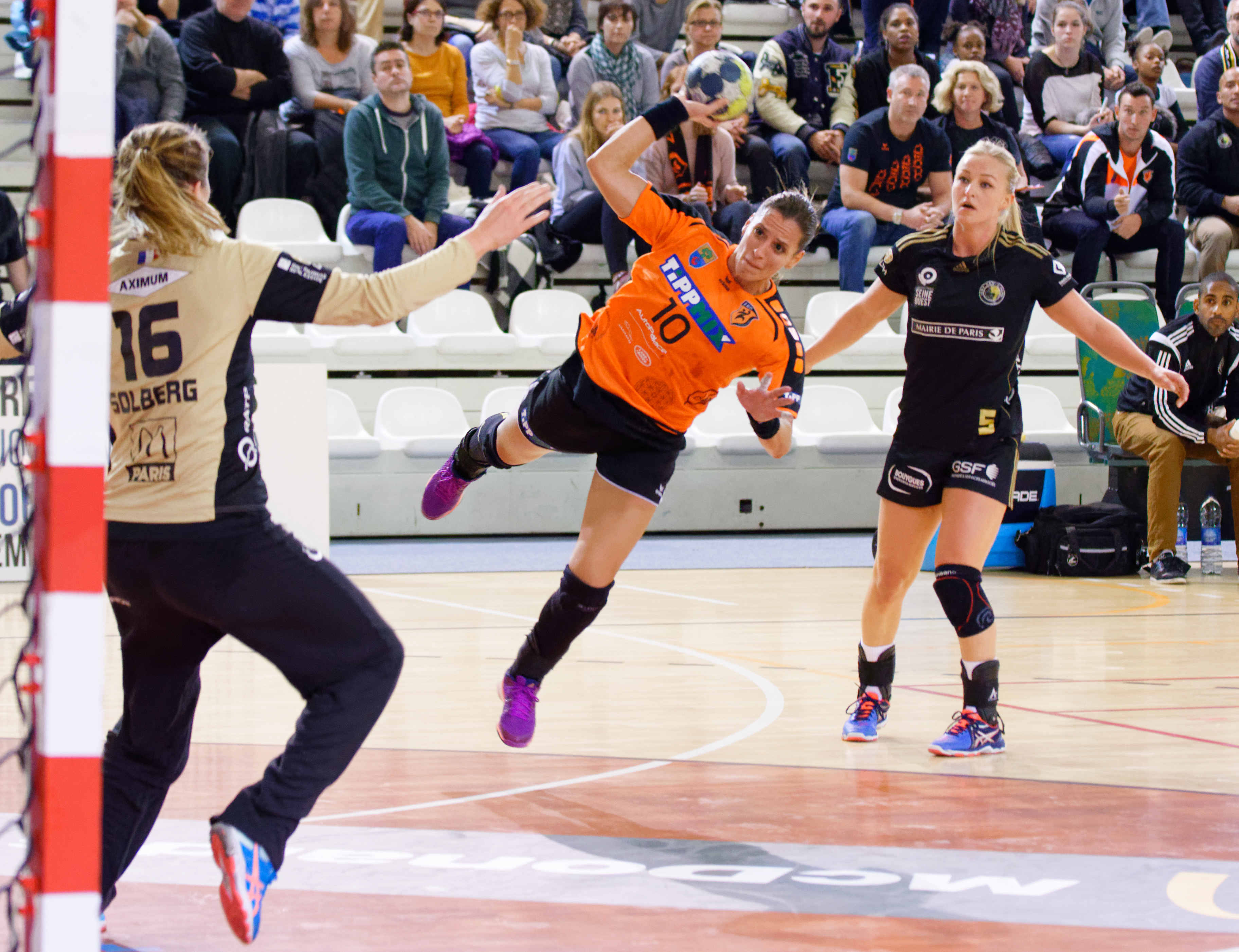 Rencontre du 2e tour de la coupe EHF entre Issy Paris Hand et Érd HC. A Issy Les Moulineaux, le 23 octobre 2016.